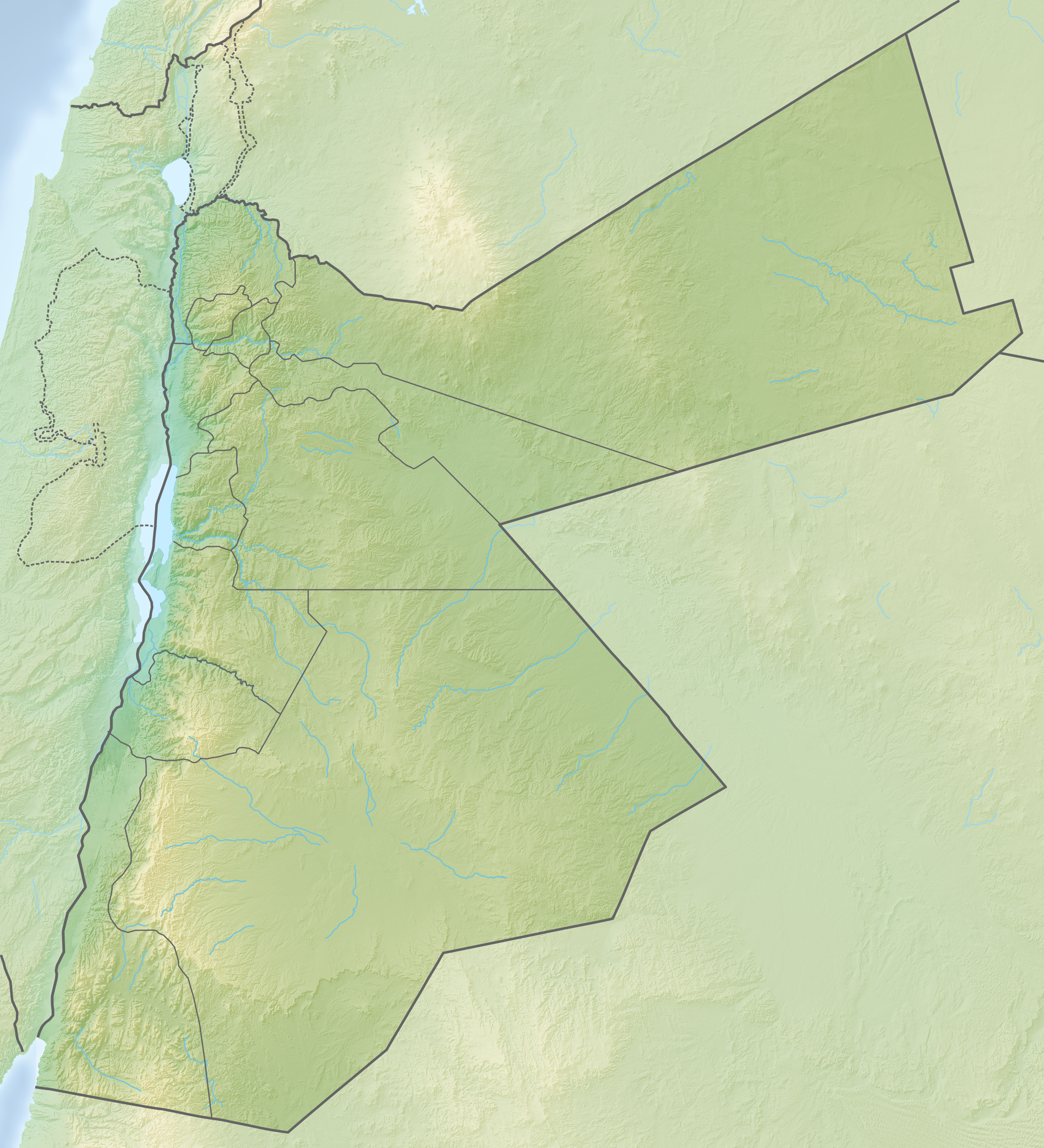 Reliefkarte Jordanien Topographischer Hintergrund: NASA Shuttle Radar Topography Mission (public domain). SRTM3 v.2. Grenzen: Jordan location map.svg